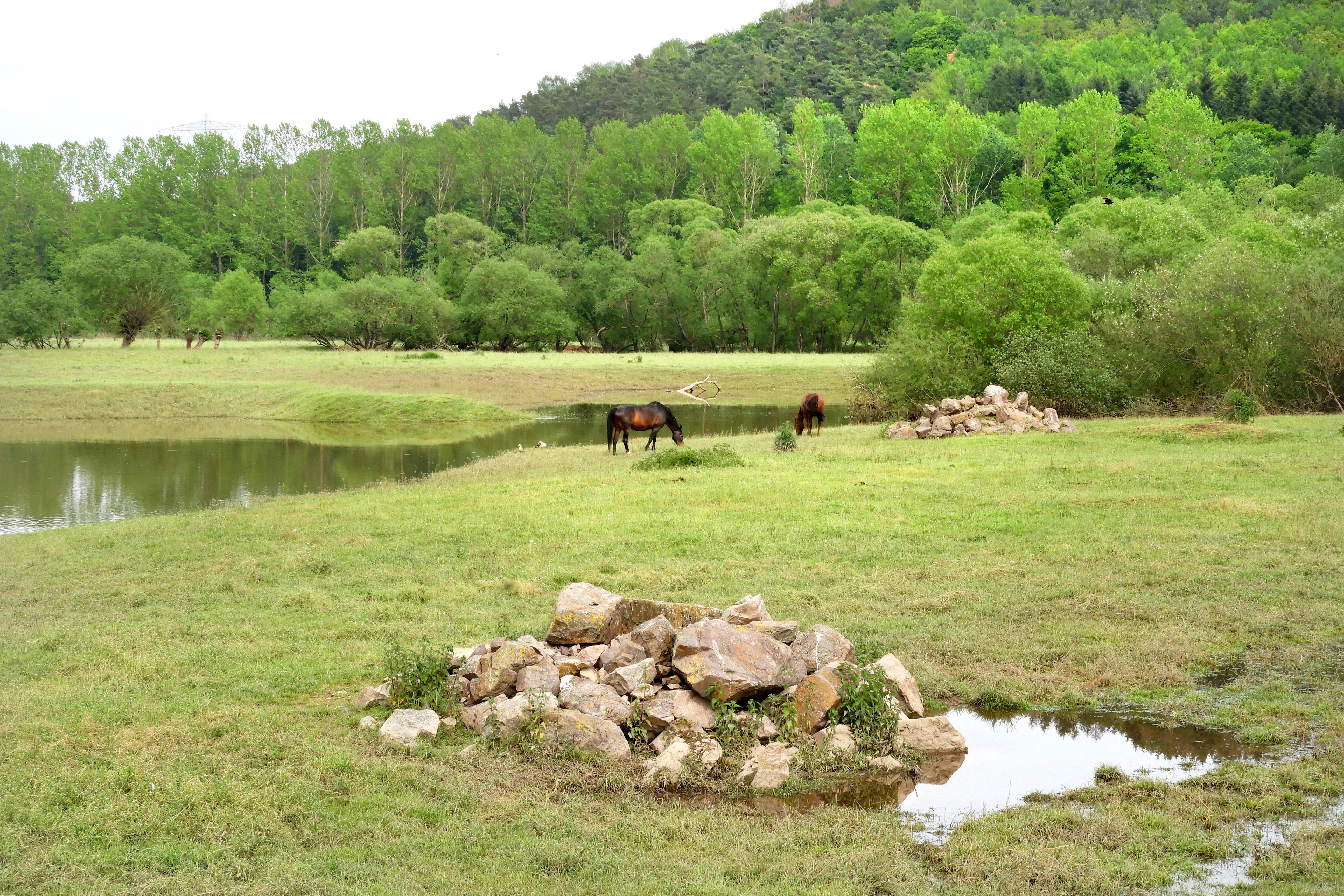 Die „Alte Fulda bei Blankenheim“ ist ein Altwasserbiotop am Mittellauf der Fulda nordöstlich der Gemeinde Blankenheim, einem Stadtteil von Bebra im Landkreis Hersfeld-Rotenburg. Als regional bedeutende Lebensstätte brütender und „Trittstein" für durchziehende Vogelarten ist der im Dezember 1981 zum Naturschutzgebiet erklärte Bereich aus ornithologischer Sicht von großer Bedeutung. Das Naturschutzgebiet liegt vollständig in dem Flora-Fauna-Habitat-Gebiet 5024-305 „Auenwiesen von Fulda, Rohrbach und Solz“, EU-Vogelschutzgebiet 5024-401 „Fuldatal zwischen Rotenburg und Niederaula“ und Landschaftsschutzgebiet „Auenverbund Fulda“. This is a picture of the protected area listed at WDPA under the ID 81266